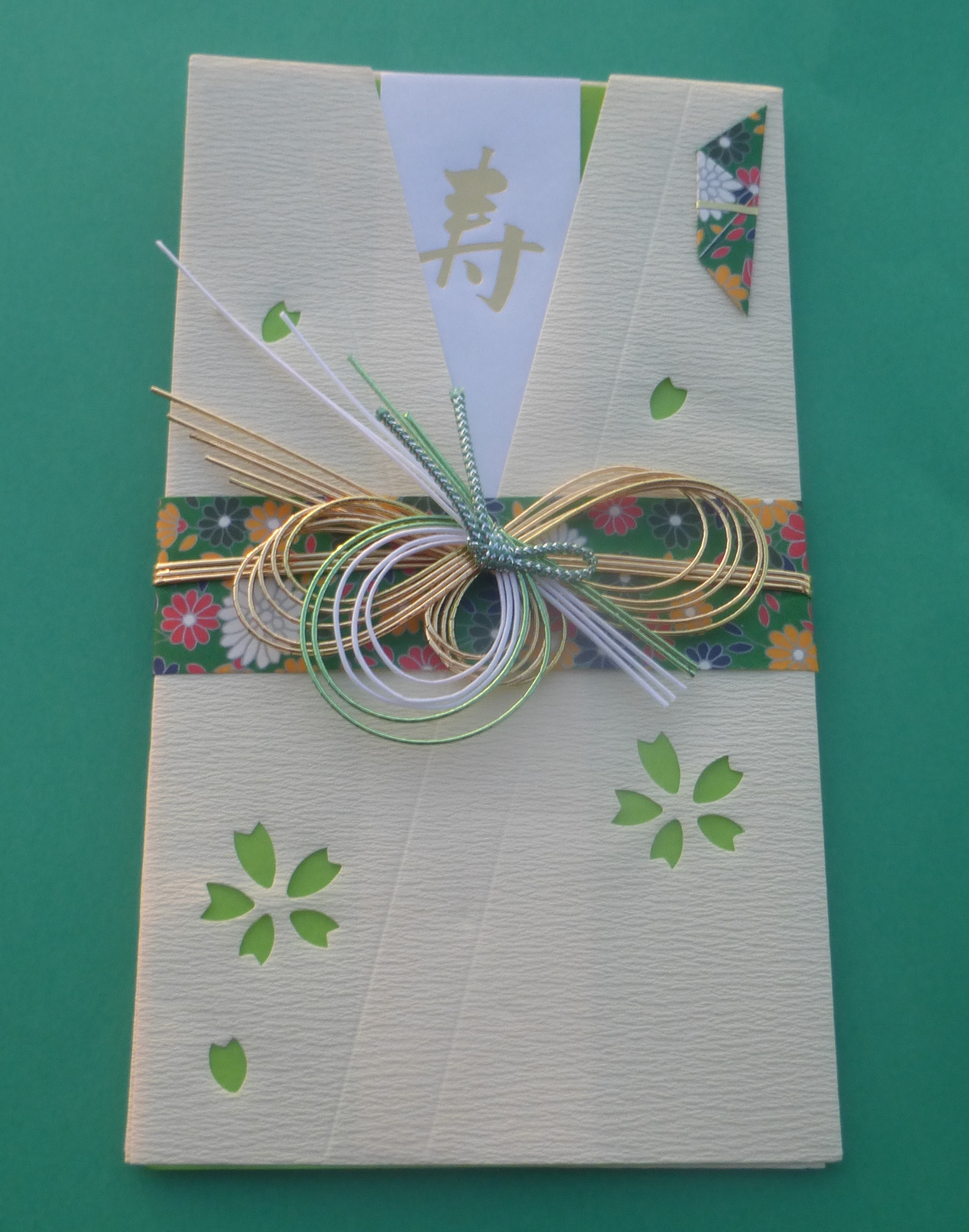 shūgi-bukuro (祝儀袋)